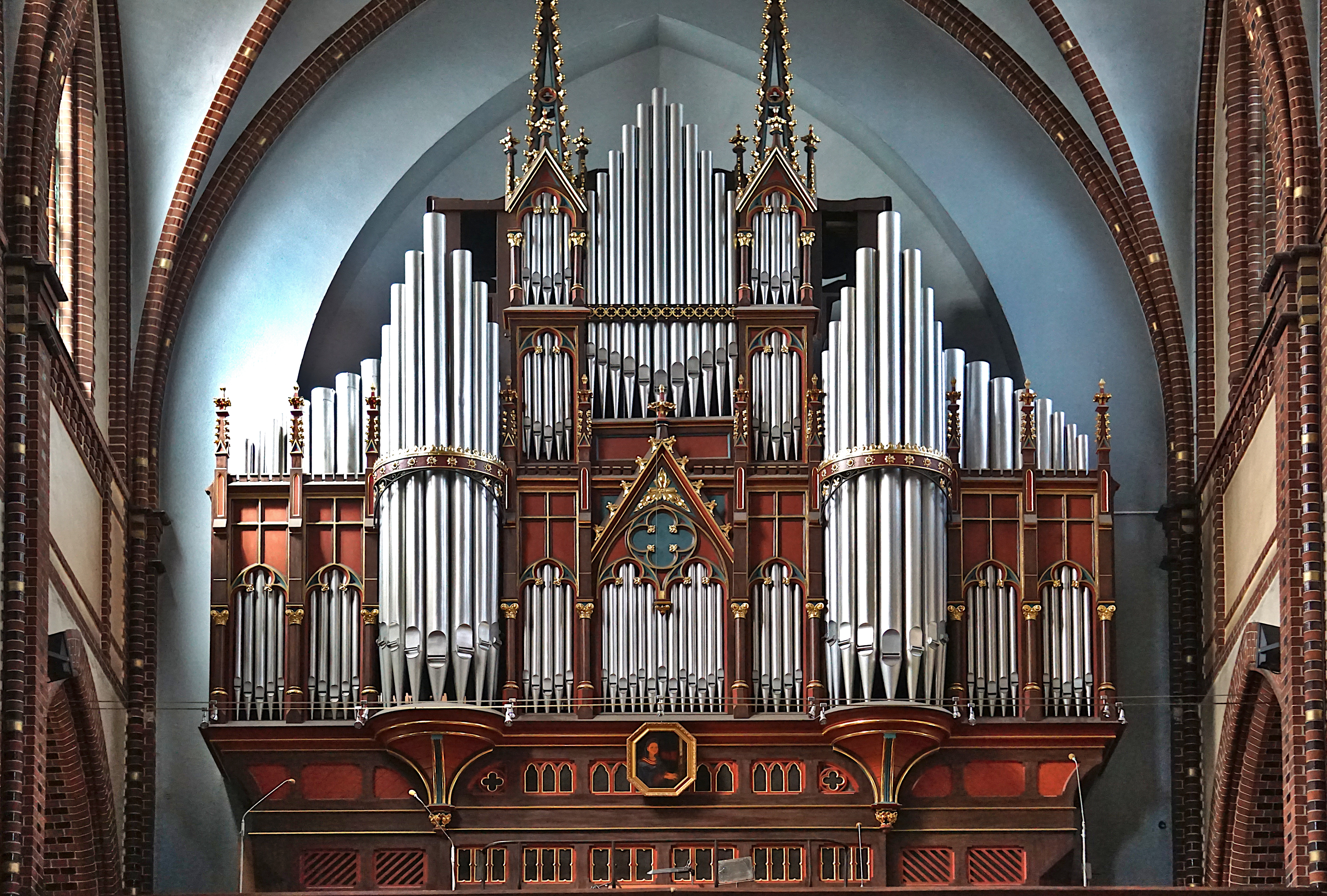 Gliwice, Instrument muzyczny (organy i prospekt) w kościele katedralnym pw. Apostołów Piotra i Pawła.